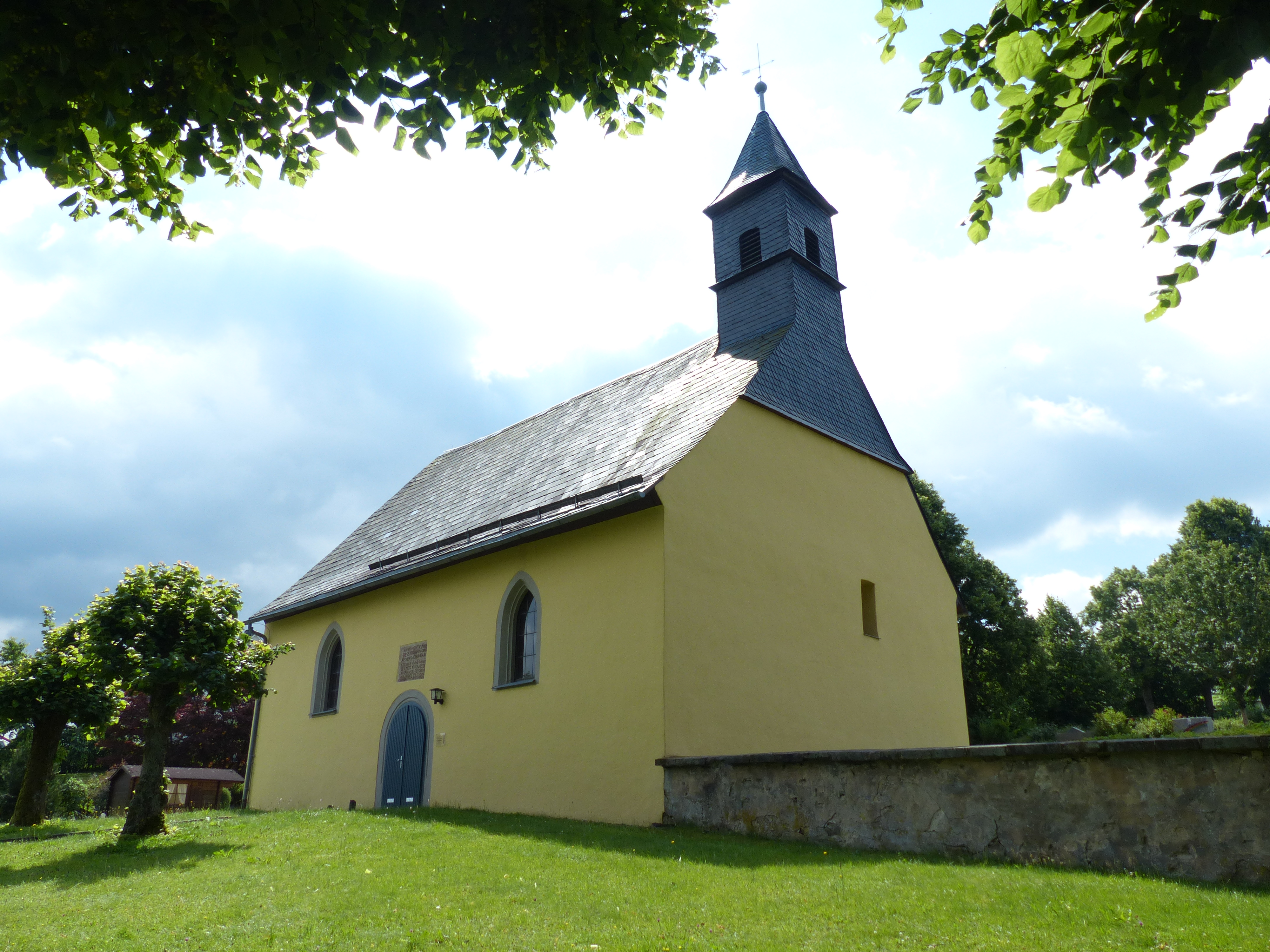 Friedhofskirche in Stammbach, Außenansichten